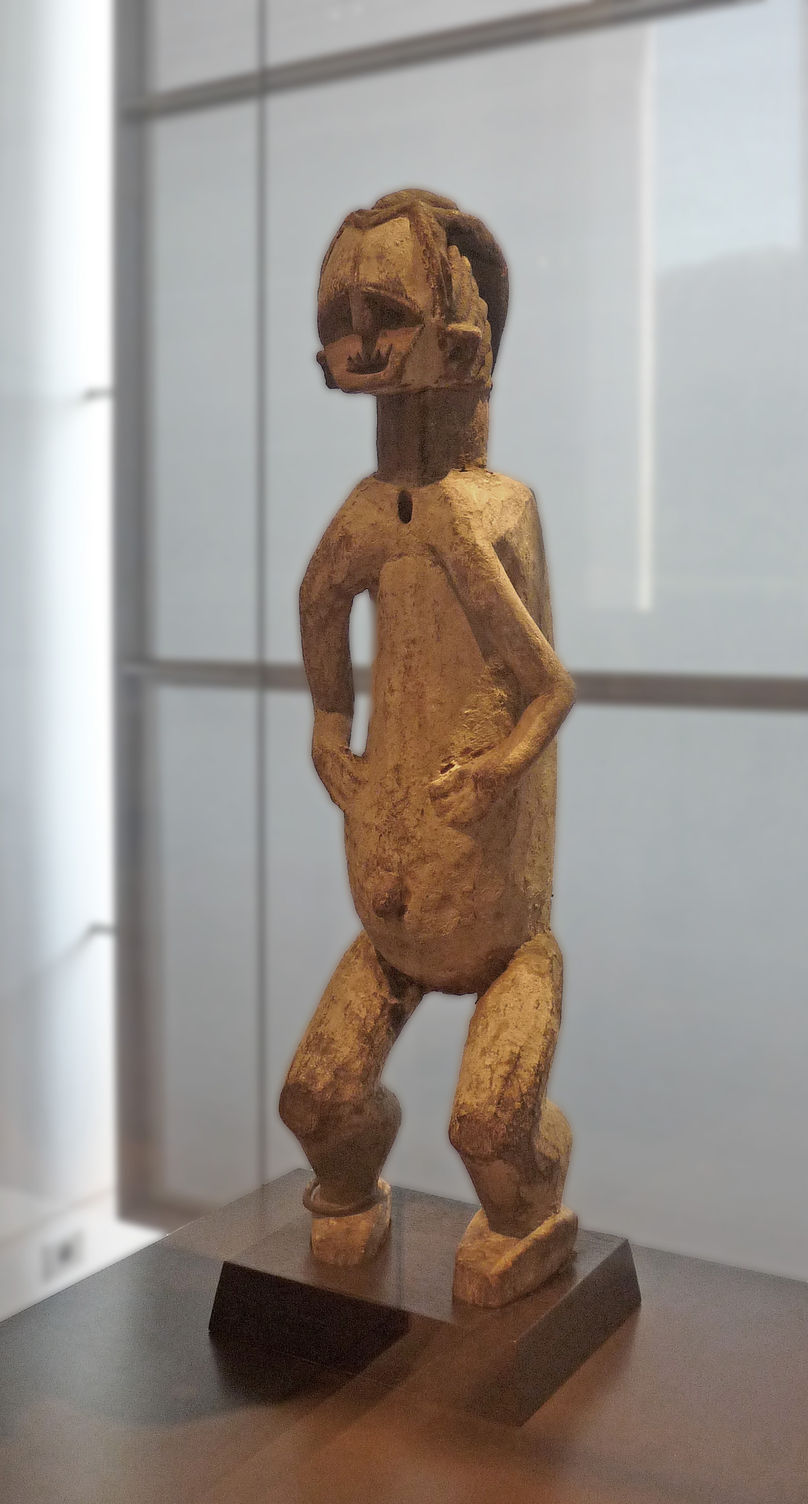 Statue reliquaire m'bété. Gabon ou République du Congo. XIXe-début du XXe siècle. Bois, pigments, métal. Pavillon des Sessions, Musée du Louvre